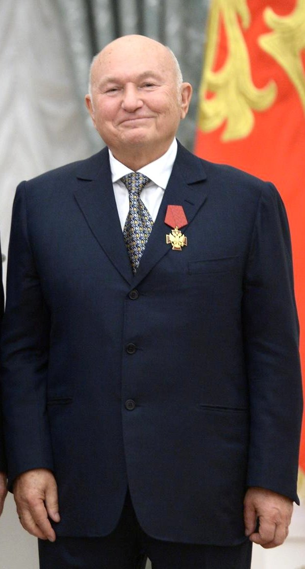 Вручение государственных наград Российской Федерации. Орденом «За заслуги перед Отечеством» IV степени награждён Юрий Лужков